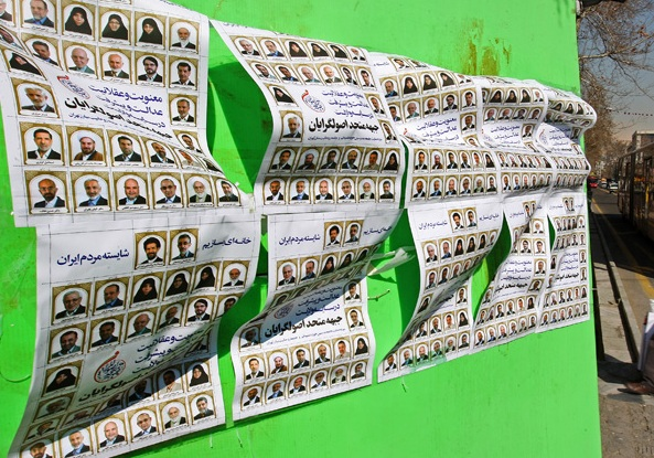 Incantations during the 2012 Iranian legislative election